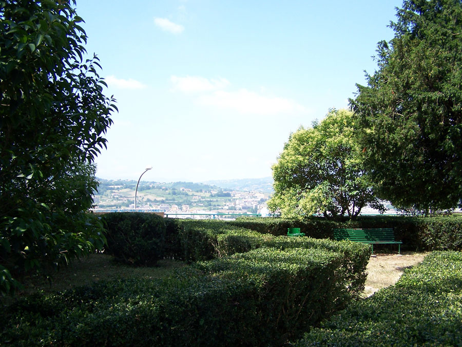 I giardini Pepicelli in cima al Viale degli Atlantici, a Benevento